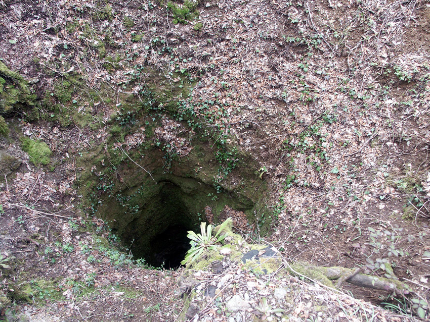 Valle dello Stragaio - Pozzino minerario medievale - Parco Tecnologico Archeologico delle Colline Metallifere Grossetane